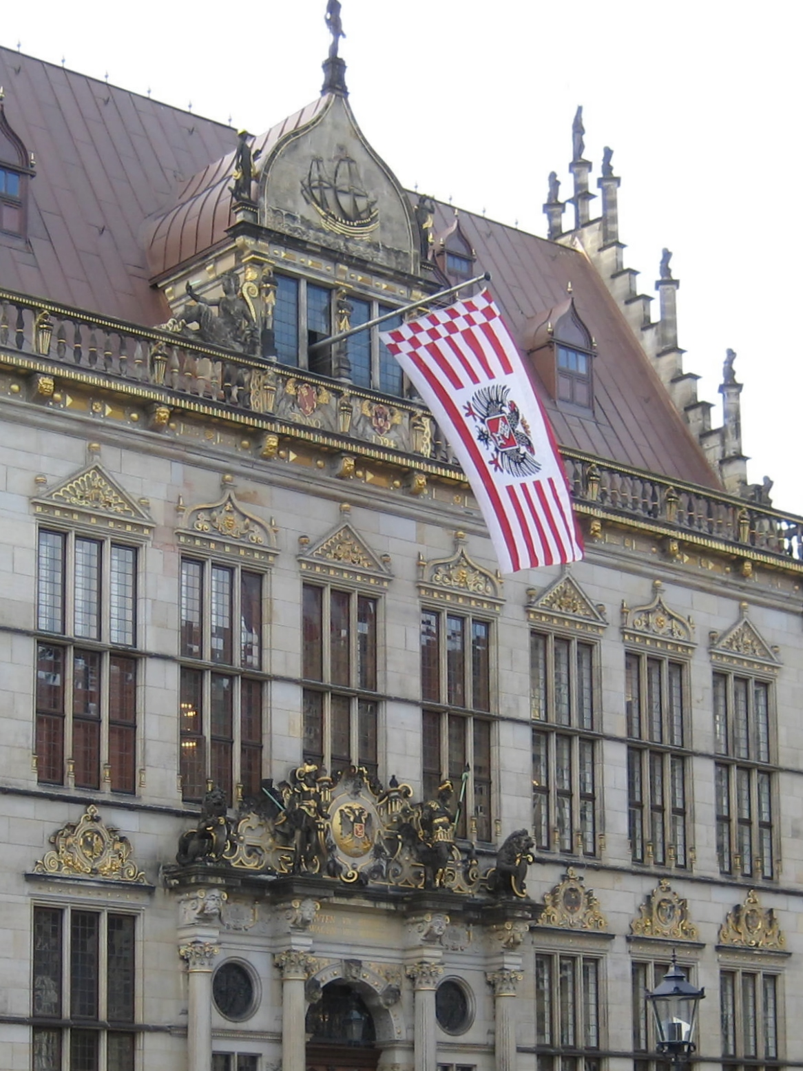 Teilansicht von Haus Schütting am Bremer Marktplatz, Sitz der Handelskammer Bremen (hier mit Flaggenschmuck am Tage der 467. Schaffermahlzeit 2011). Details an der Marktfront: Schiffsgiebel mit Koggen-Motiv, Bremische Flagge mit dem Bremer Kaufmannswappen sowie Schmuckgiebel über dem Eingangsportal mit dem Bremer Kaufmannswappen.